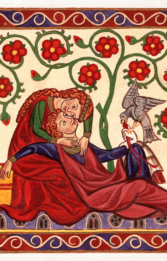 Codex Manesse, UB Heidelberg, Cod. Pal. germ. 848, fol. 249v: Herr Konrad von Altstetten. Das Geschlecht derer von Altstetten ist seit 1166 bezeugt und hatte seinen Sitz im Oberrheintal. Es stand in den Diensten des Abtes von St. Gallen. Vermutlich handelt es sich bei dem Minnesänger um den 1320 bis 1327 urkundenden Konrad von Altstetten, der das Meieramt innehatte.